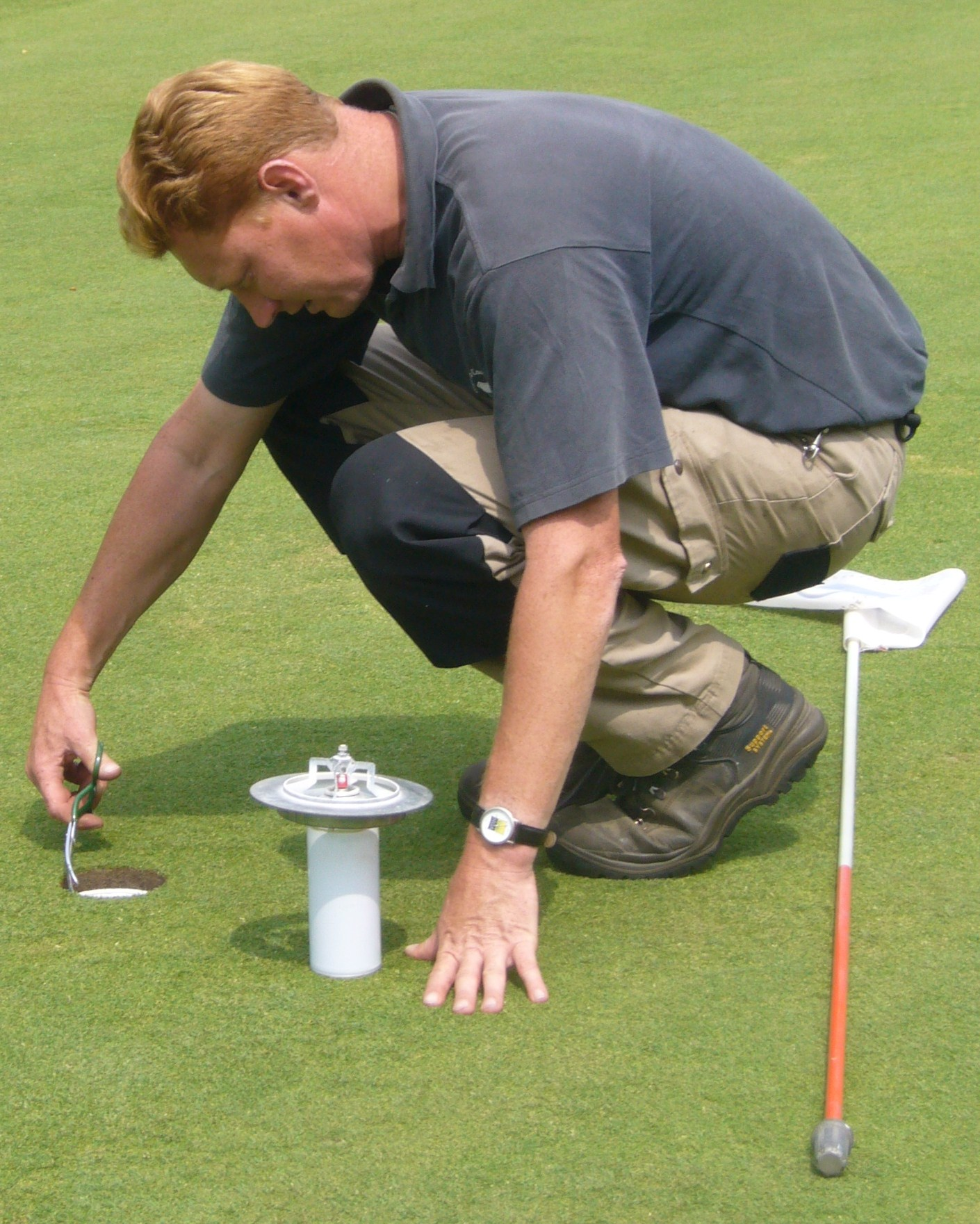 greenkeeper knipt de hole